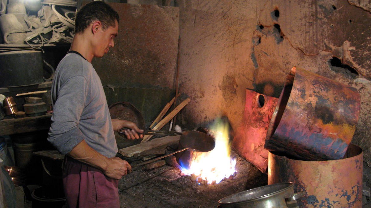 Ferblantier, Tripoli, Medina